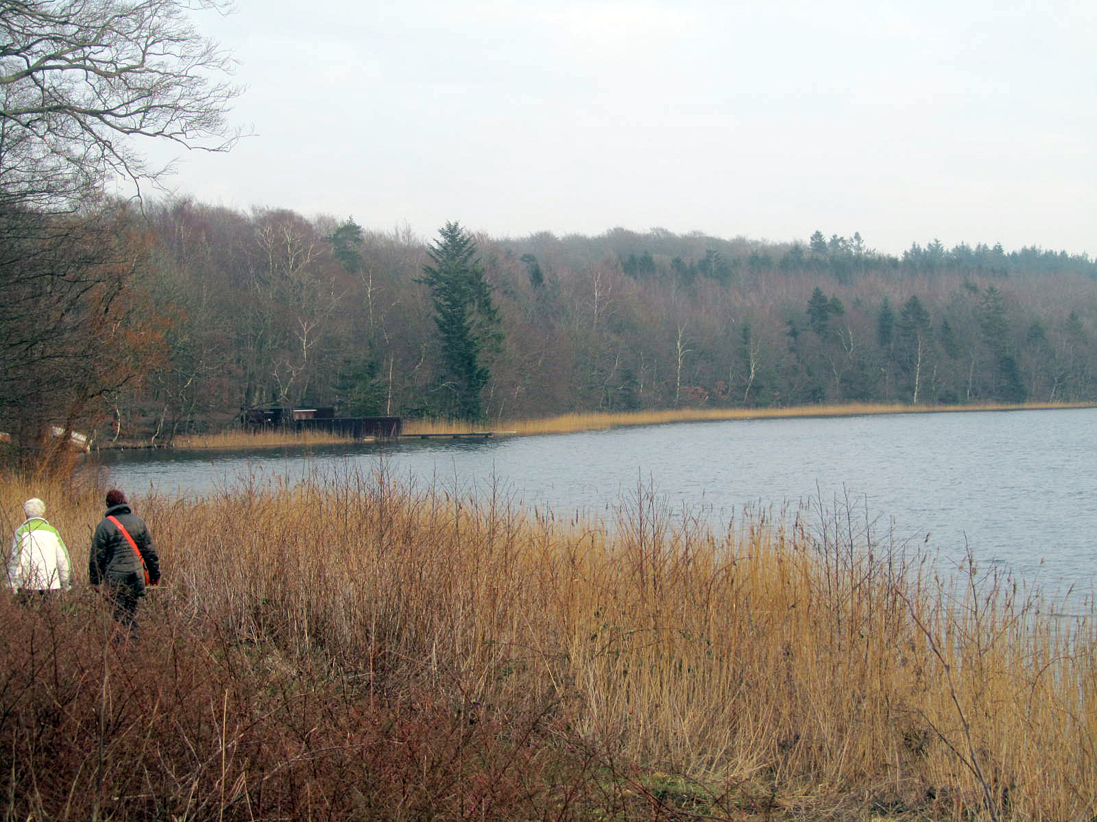 Kobskov ved nordenden af Almindsø